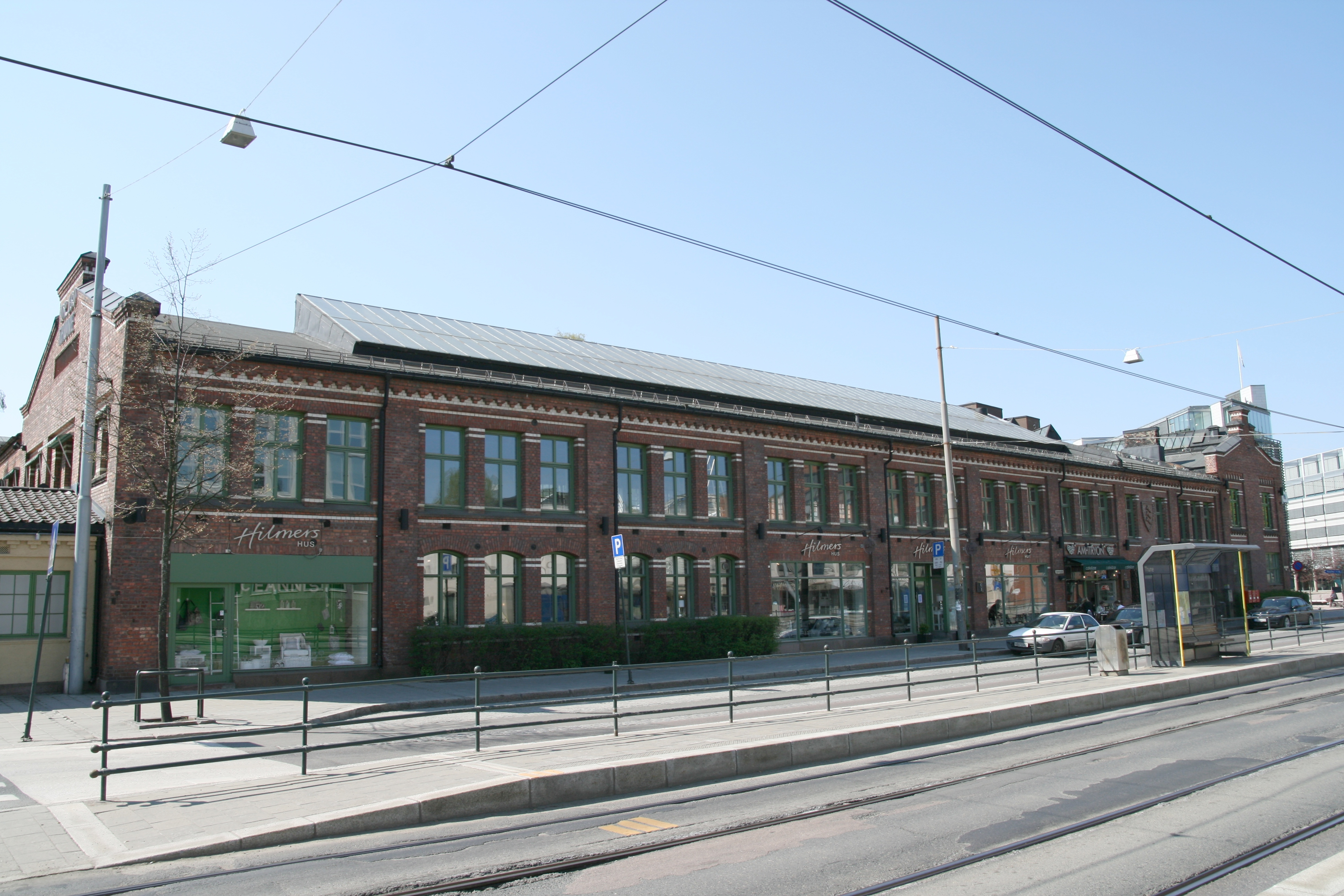 Fra Thunes mekaniske verksted på Skøyen i Oslo.